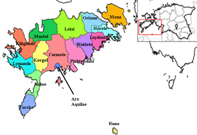 Osiliae municipia Latine